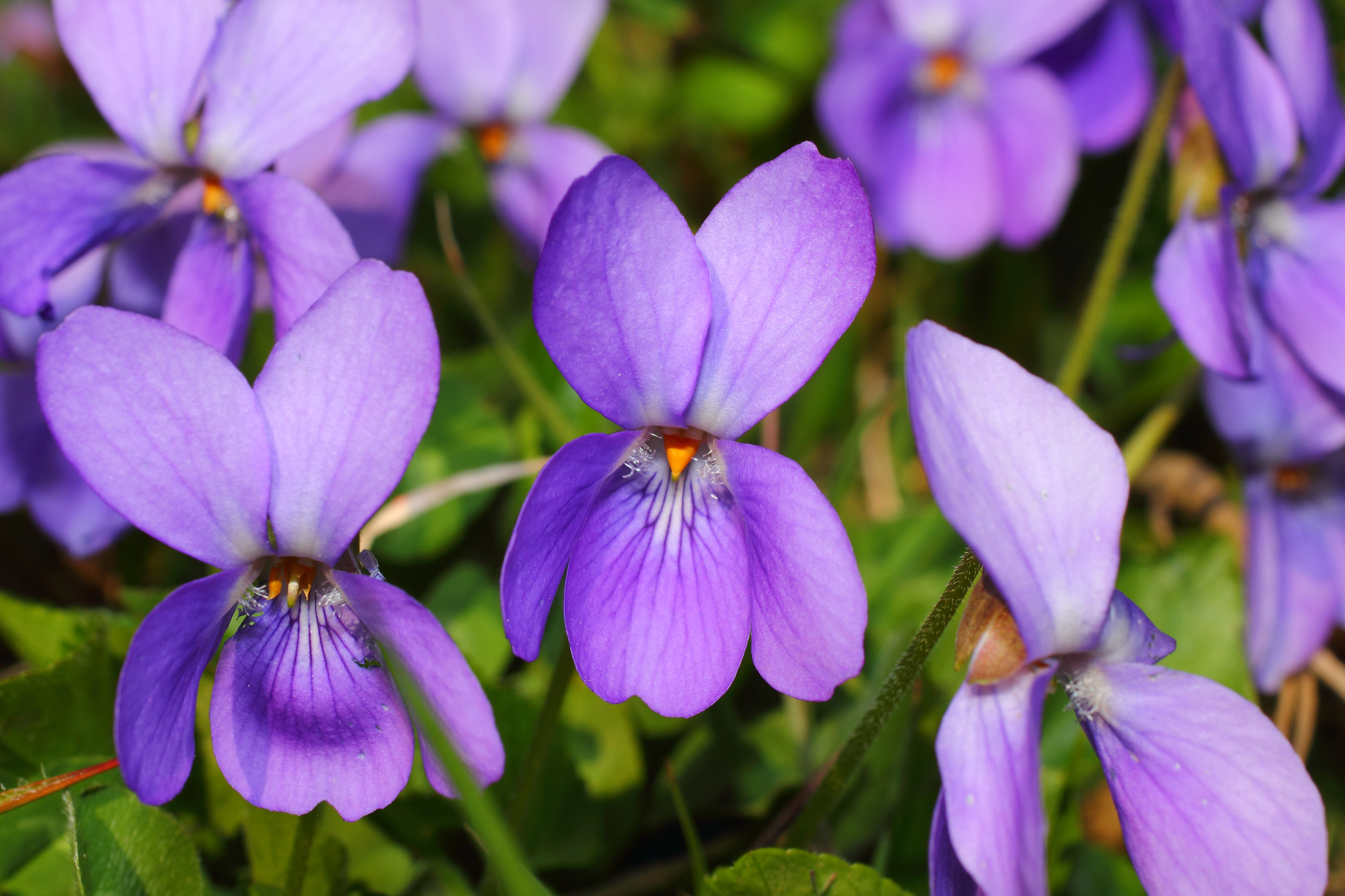 Veilchen aus der Steiermark